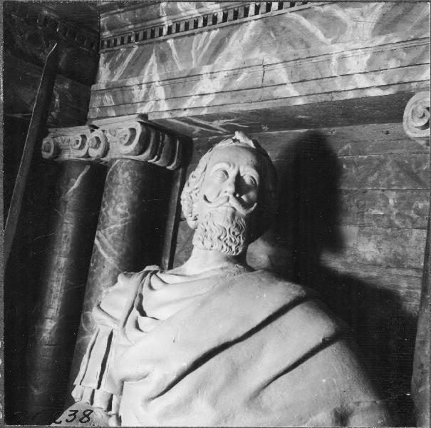 Del av gravkapell, De la Gardie, detalj av staty av Jakob De la Gardie. Kategori: (09) Gravar Del av gravkapell, De la Gardie, detalj av staty av Jakob De la Gardie.